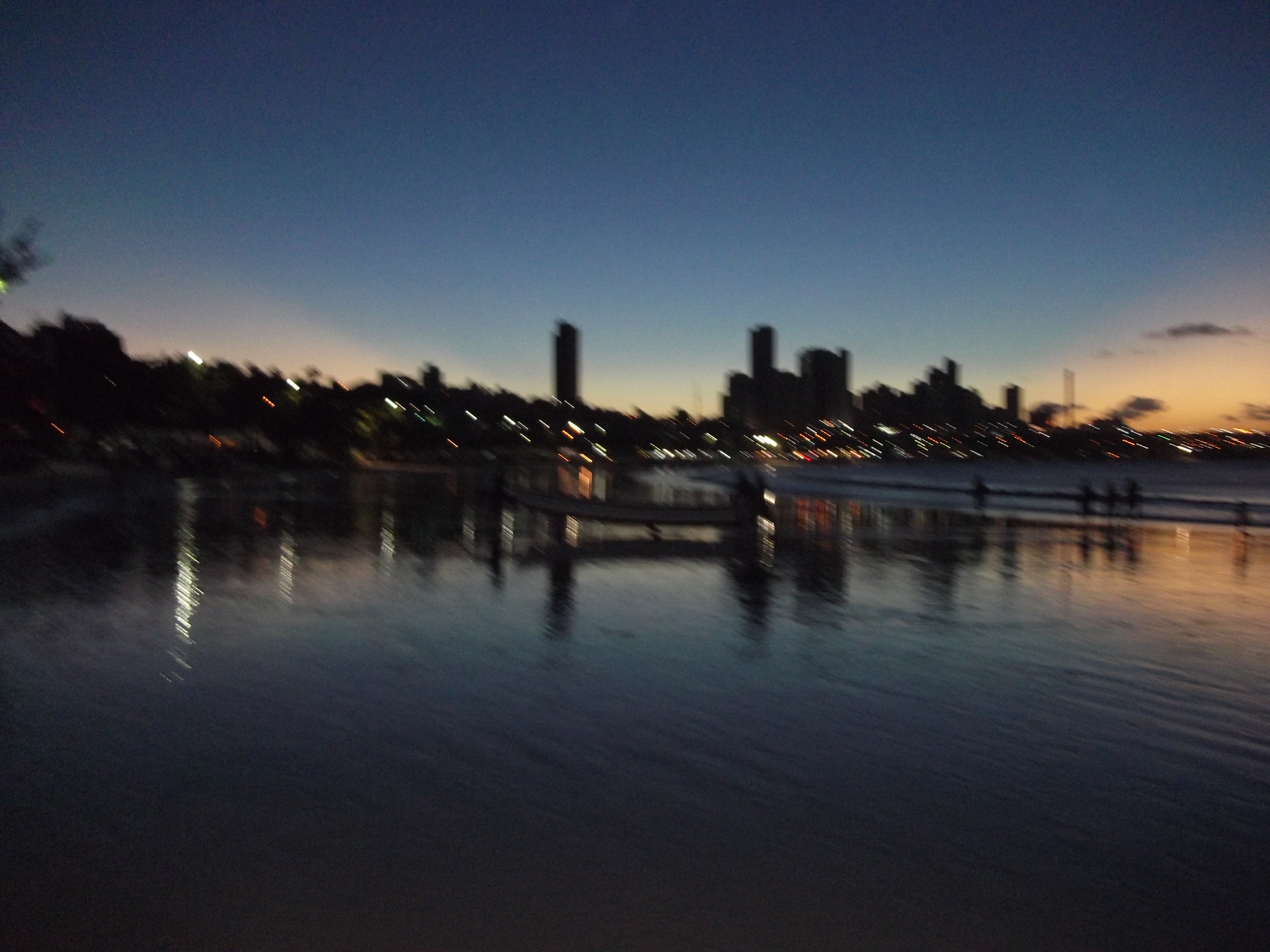 Pureza - State of Rio Grande do Norte, Brazil